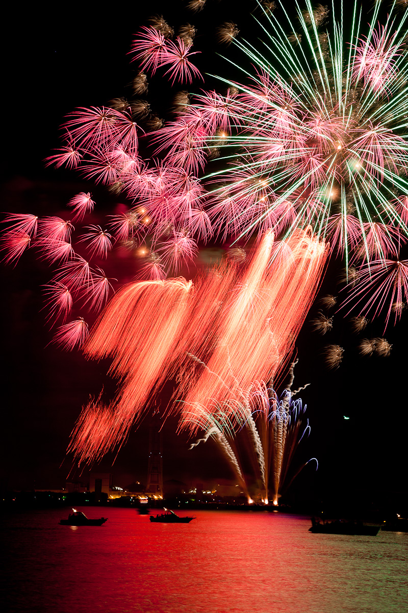 四日市花火大会 Canon EOS 5D + EF24-105mm F4L IS USM